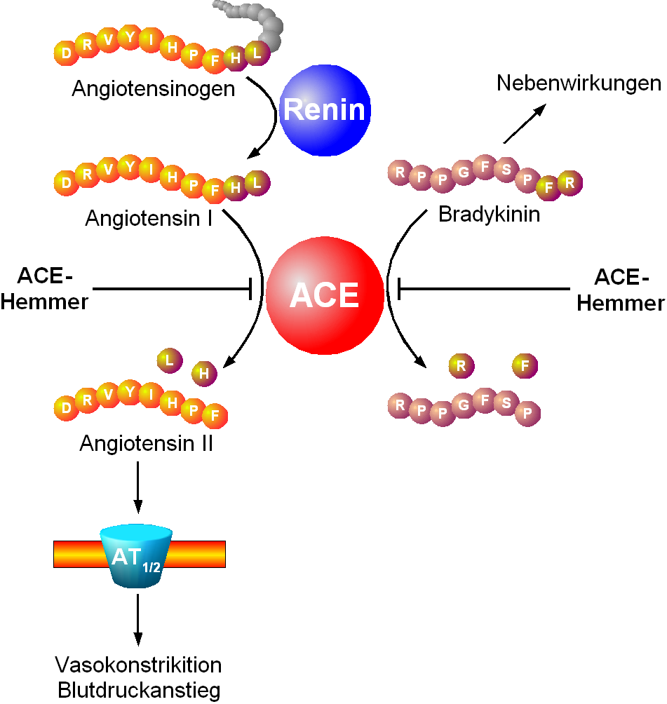 Angiffspunkt der ACE-Hemmer. Erstellt von: Sven Jähnichen. Erstellt am: 01.11.2004. Lizenz: GNU-FDL.